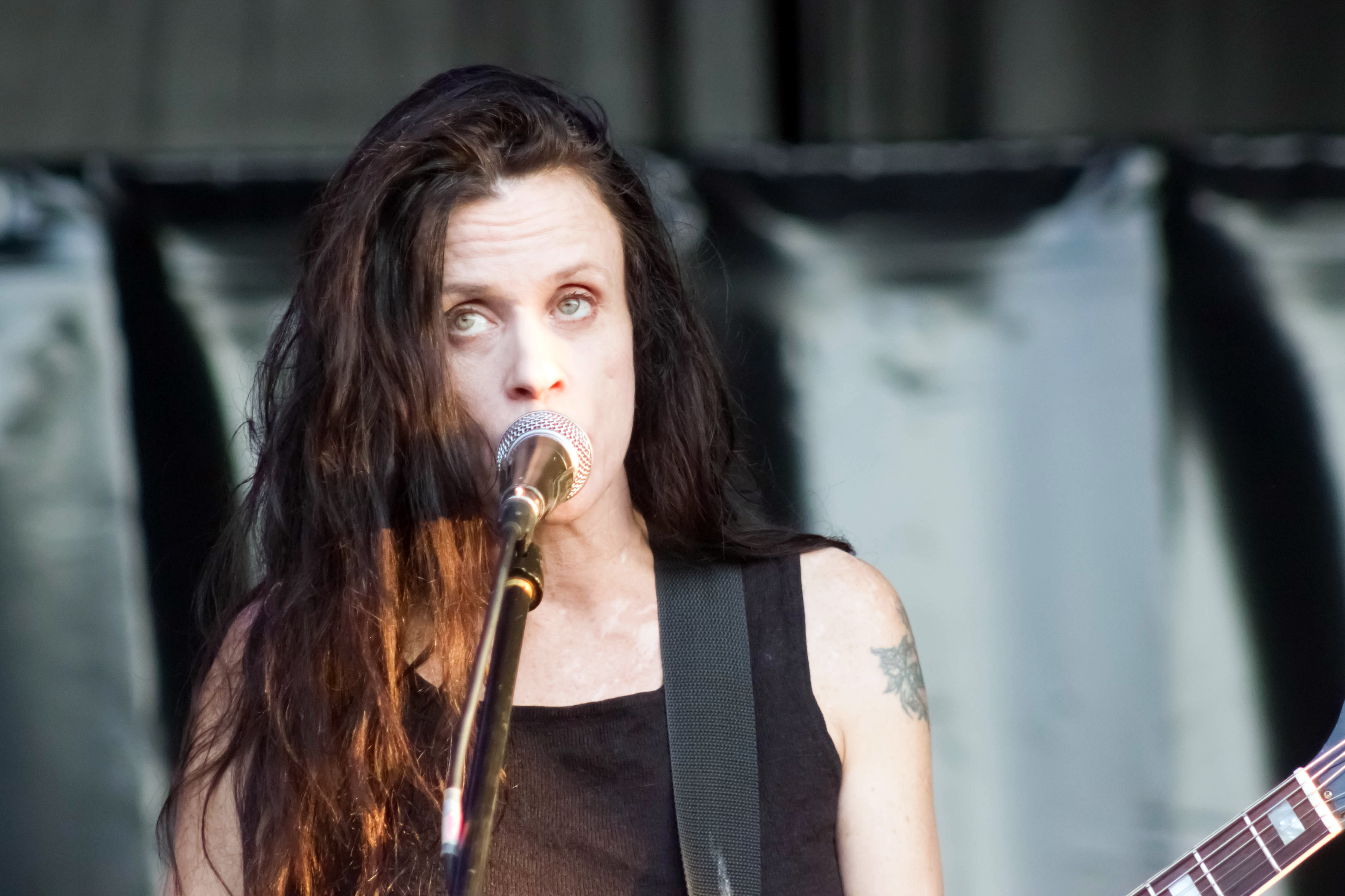 Kat Bjelland, vocalista e guitarrista da banda estadounidense Babes in Toyland, no NOS Primavera Sound 2015 de Porto.